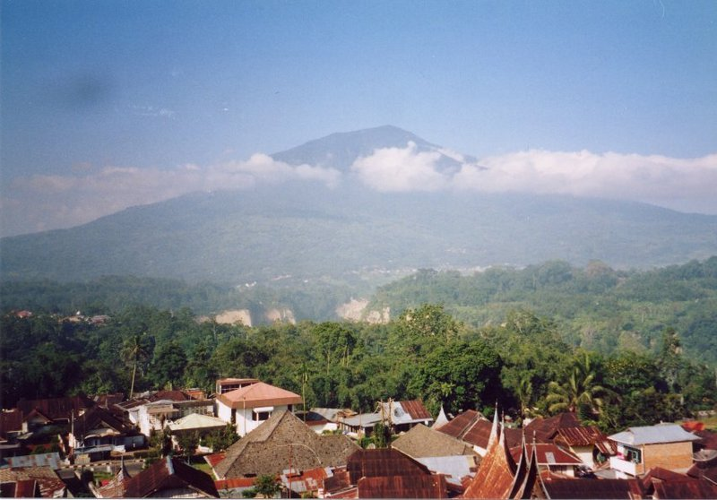 Photo taken by MichaelJLowe of Mount Singgalang, Bukittinggi, Indonesia